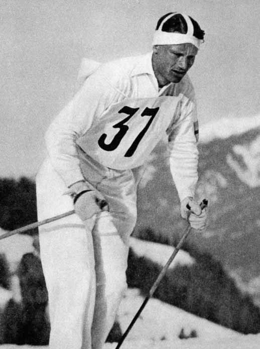 Elis Wiklund, 1936 Garmisch-Partenkirchen